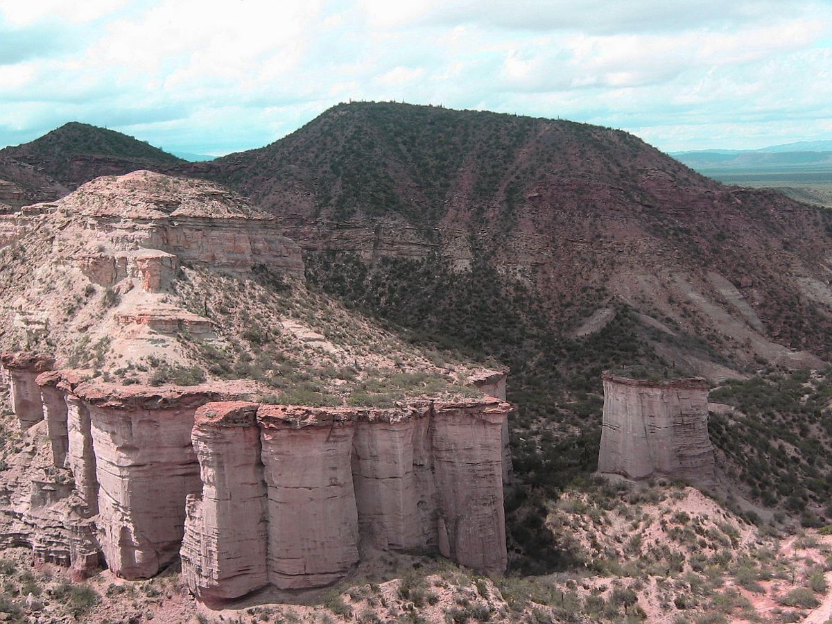 Parque Provincial El Chiflón, Provincia de La Rioja, Argentina